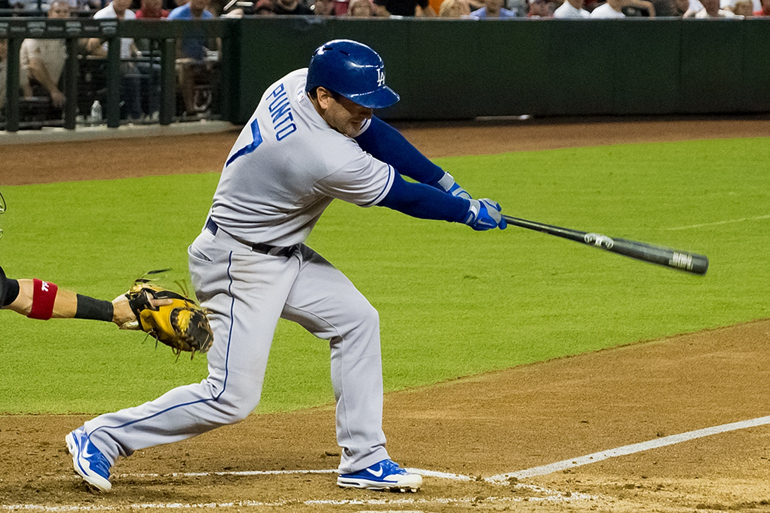 Nick Punto